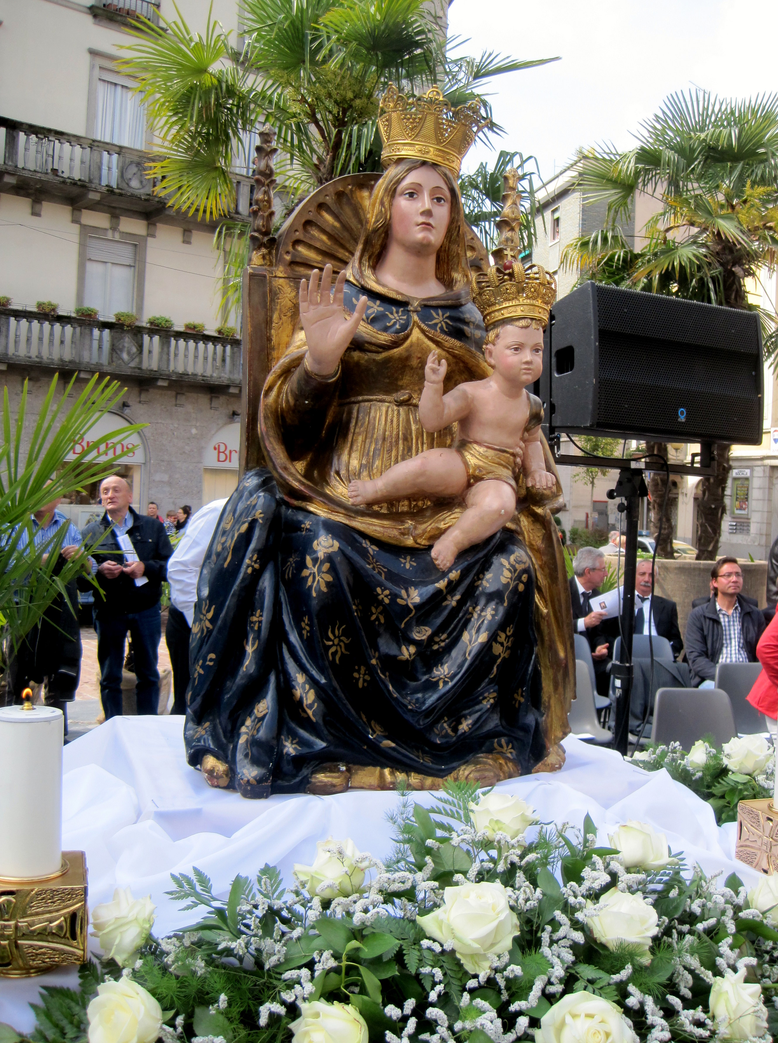 La statua della Madonna dell'Aiuto di Busto Arsizio durante il cinquecentenario. This is a photo of a monument which is part of cultural heritage of Italy.